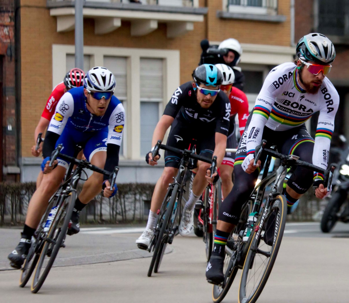 Matteo Trentin, Luke Rowe, and Peter Sagan during Kuurne-Brussels-Kuurne 2017